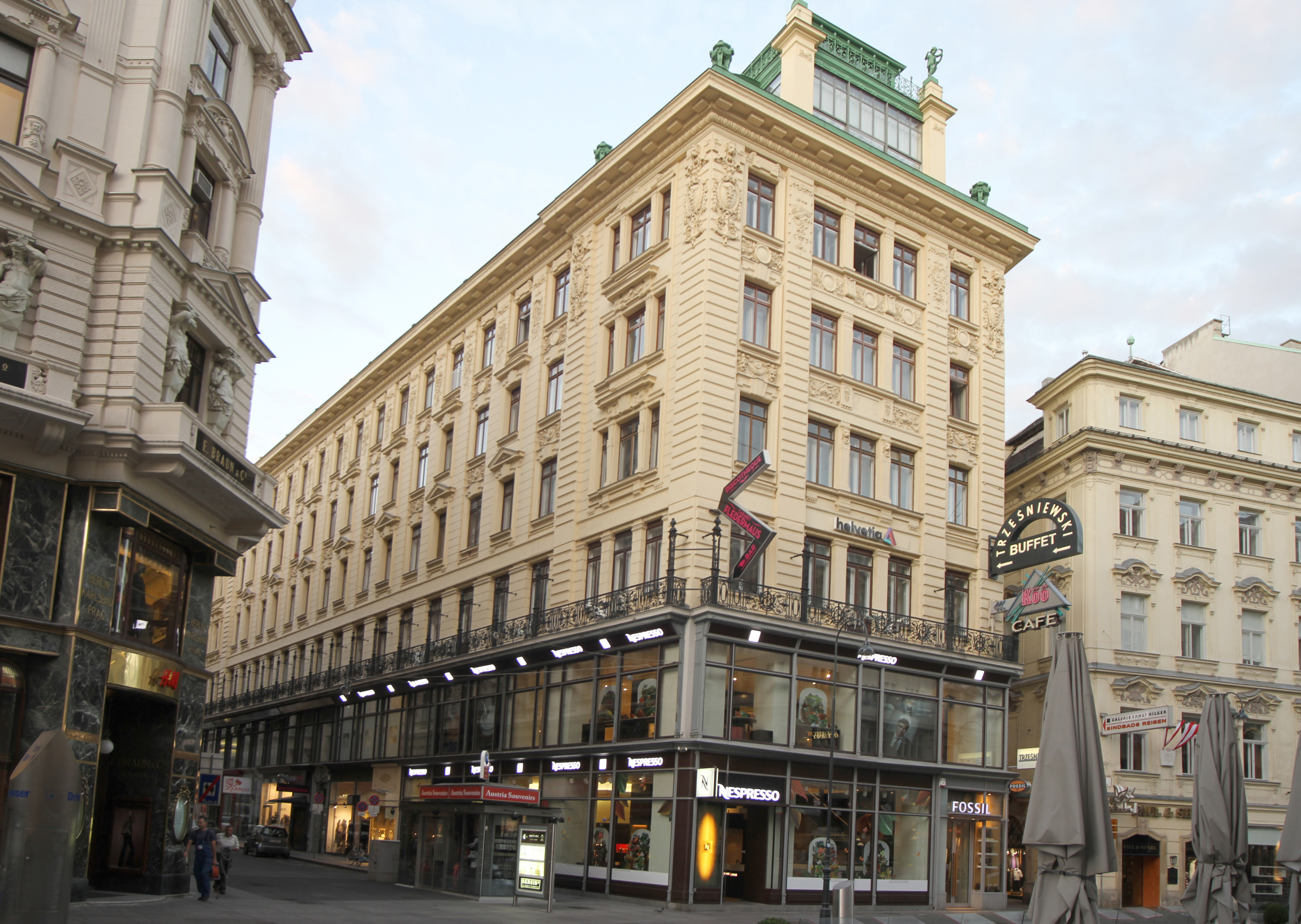 Anker-Haus